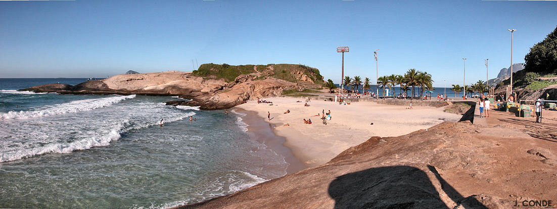 Arpoador. Devil beach (Praia do Diabo).Arpoador RJ